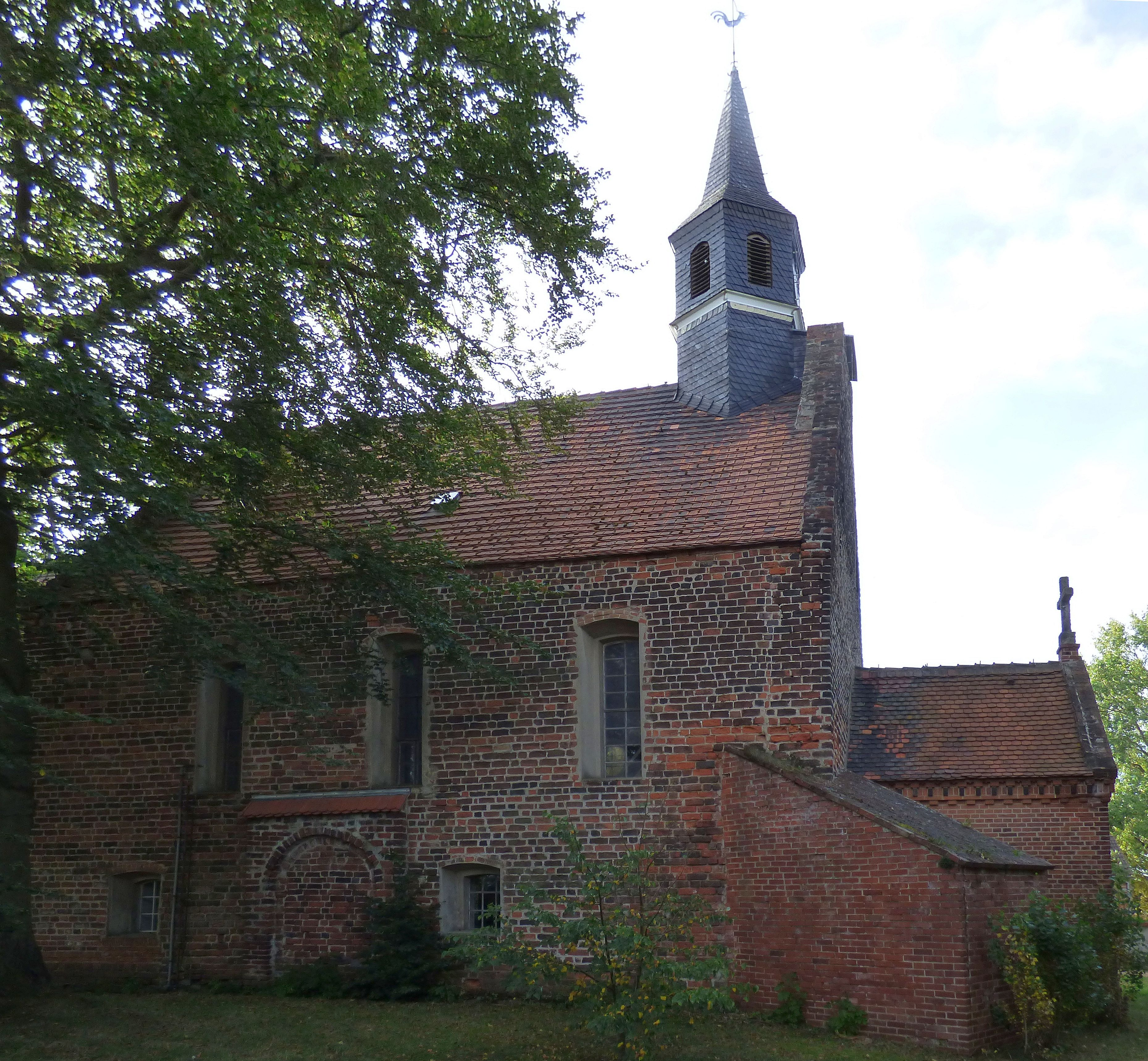 Nordseite der Dorfkirche Burxdorf